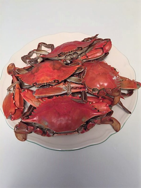 Schwimmkrabbe